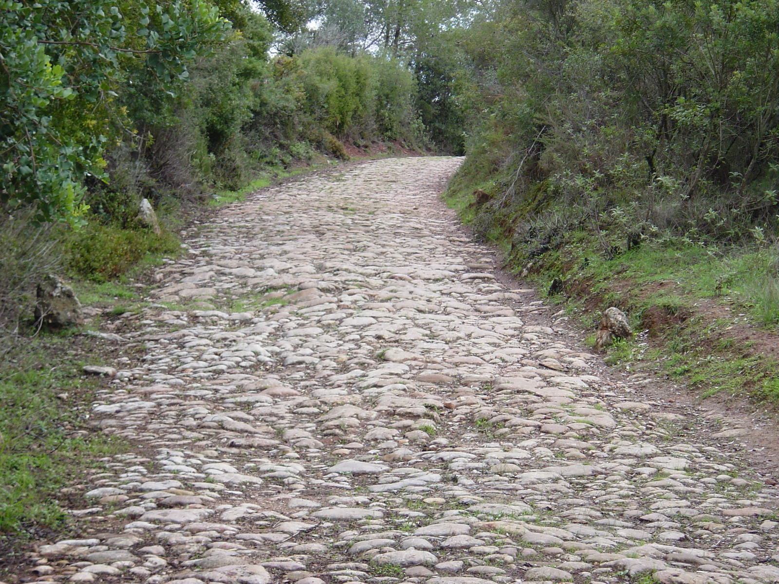 Ancient romam road at Setúbal, Portugal